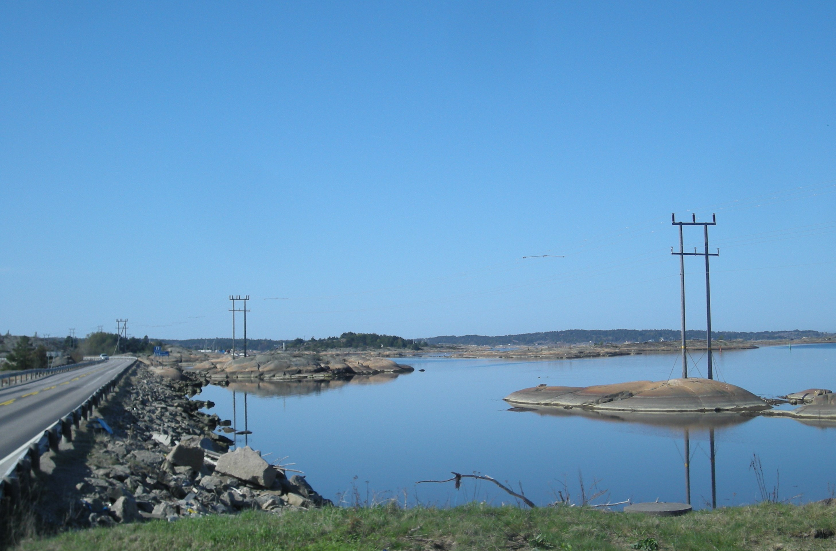 Utsikt mot Stokken og Vesterøy fra Bukkholmen, like inntil fylkesvei 108